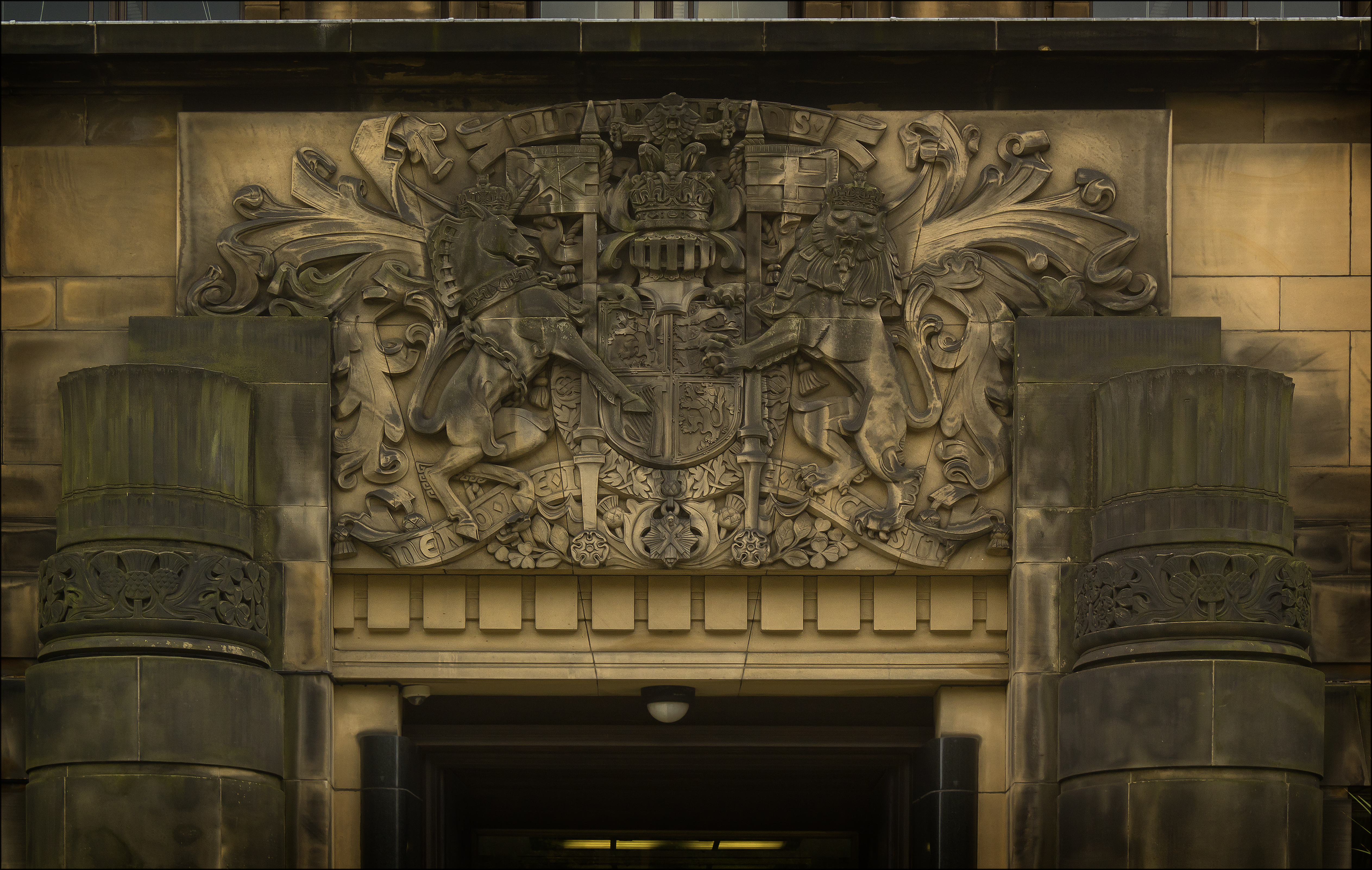 Main entrance